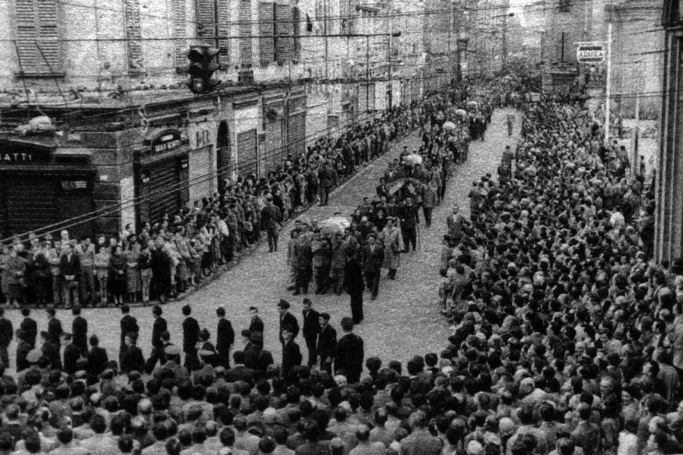 Eccidio delle Fonderie Riunite